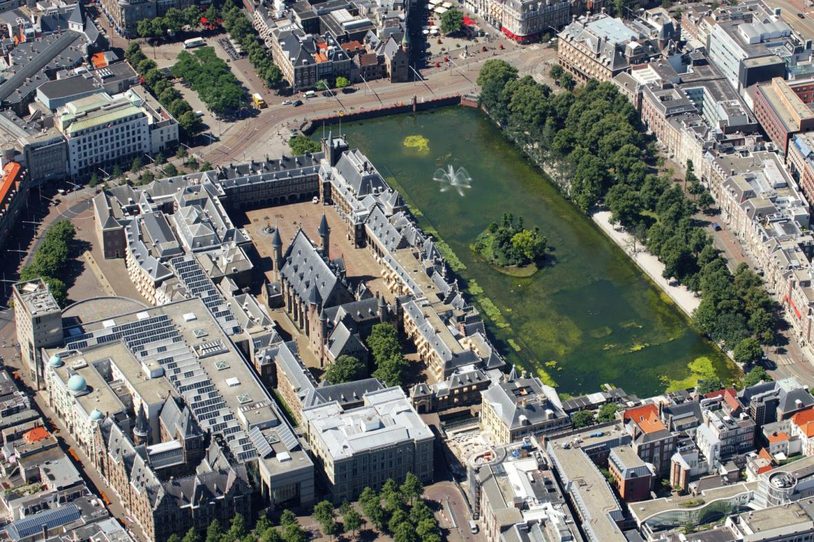 Binnenhof vanuit de lucht